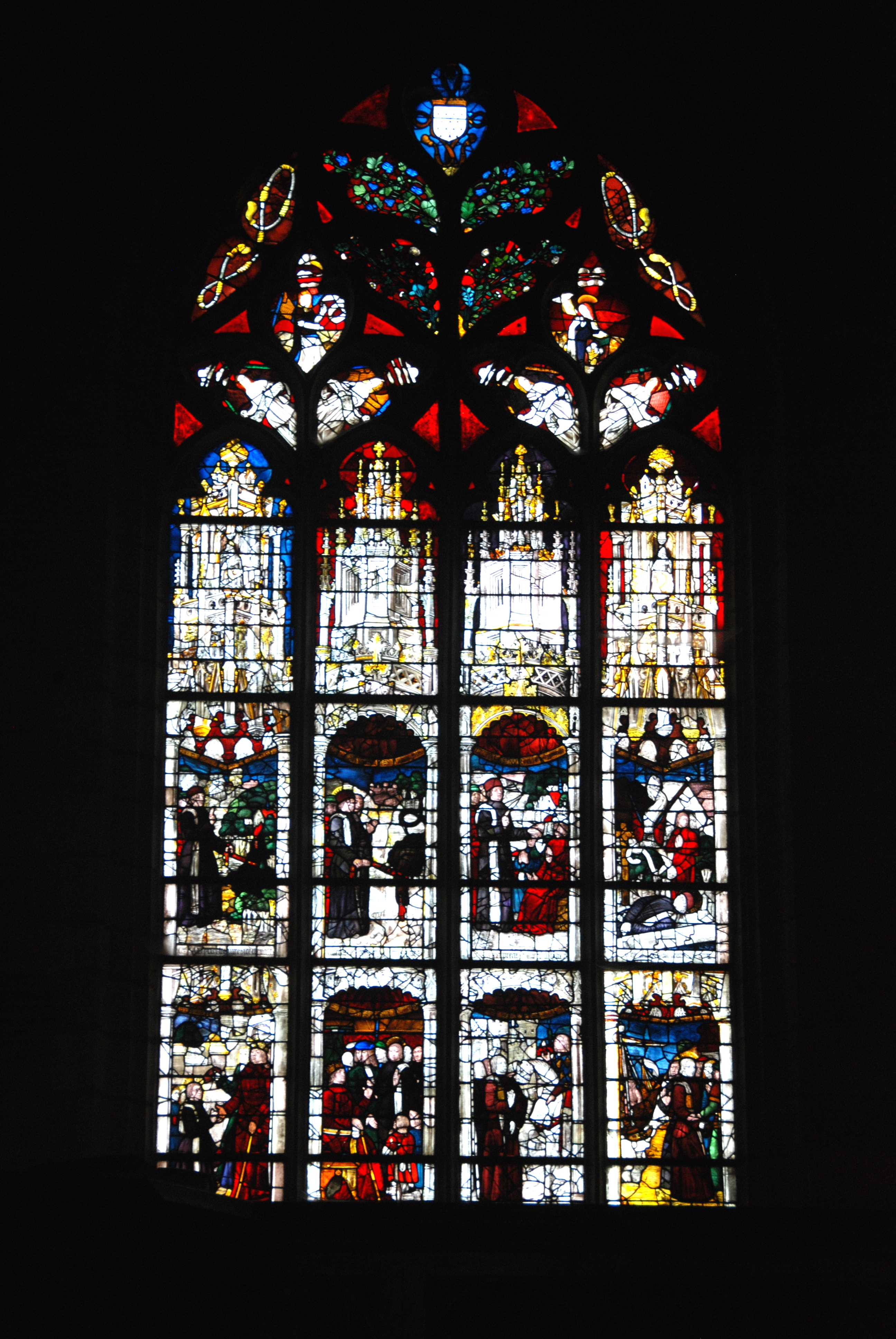 Vitrail sur la vie de Saint-Armel (XVème) - MH